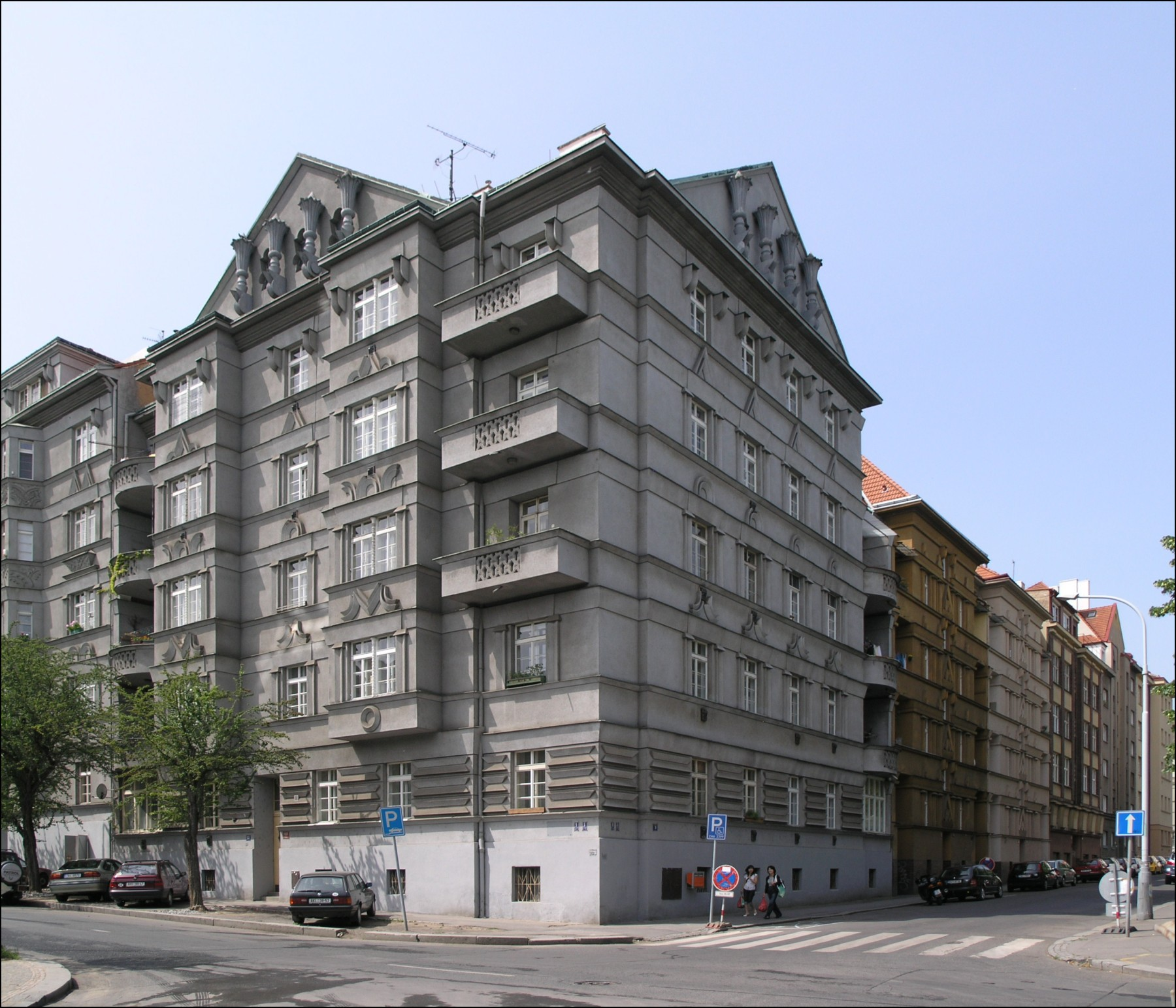 Praha, Bubeneč, dům č. p. 496 na nároží ulic Bubenečská (č. o. 53) a Českomalínská (č. o. 9).